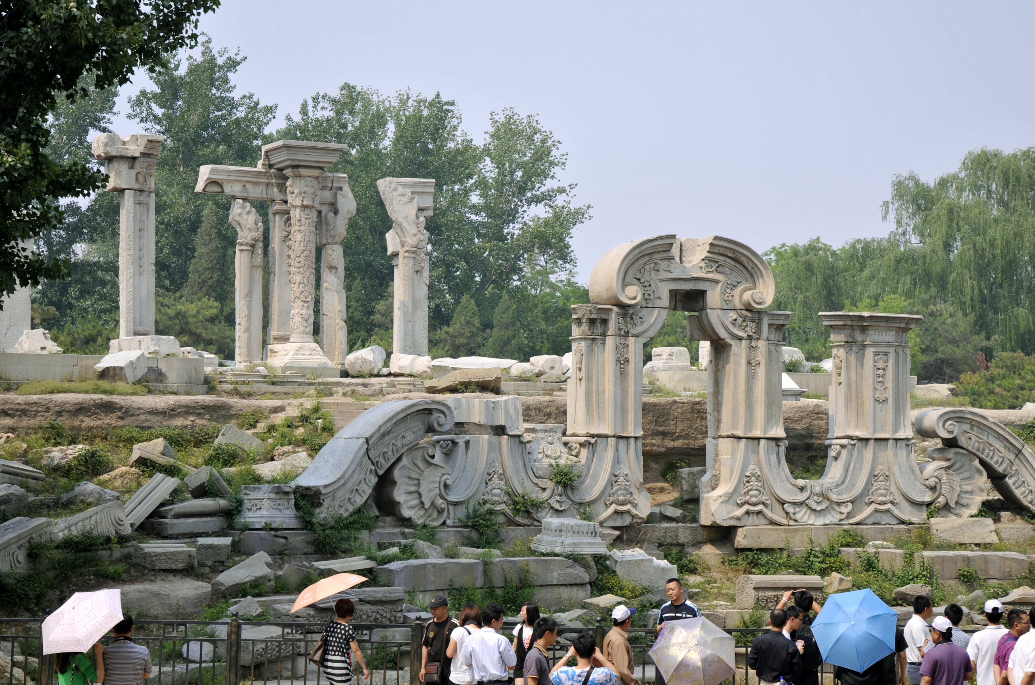 大水法遗址